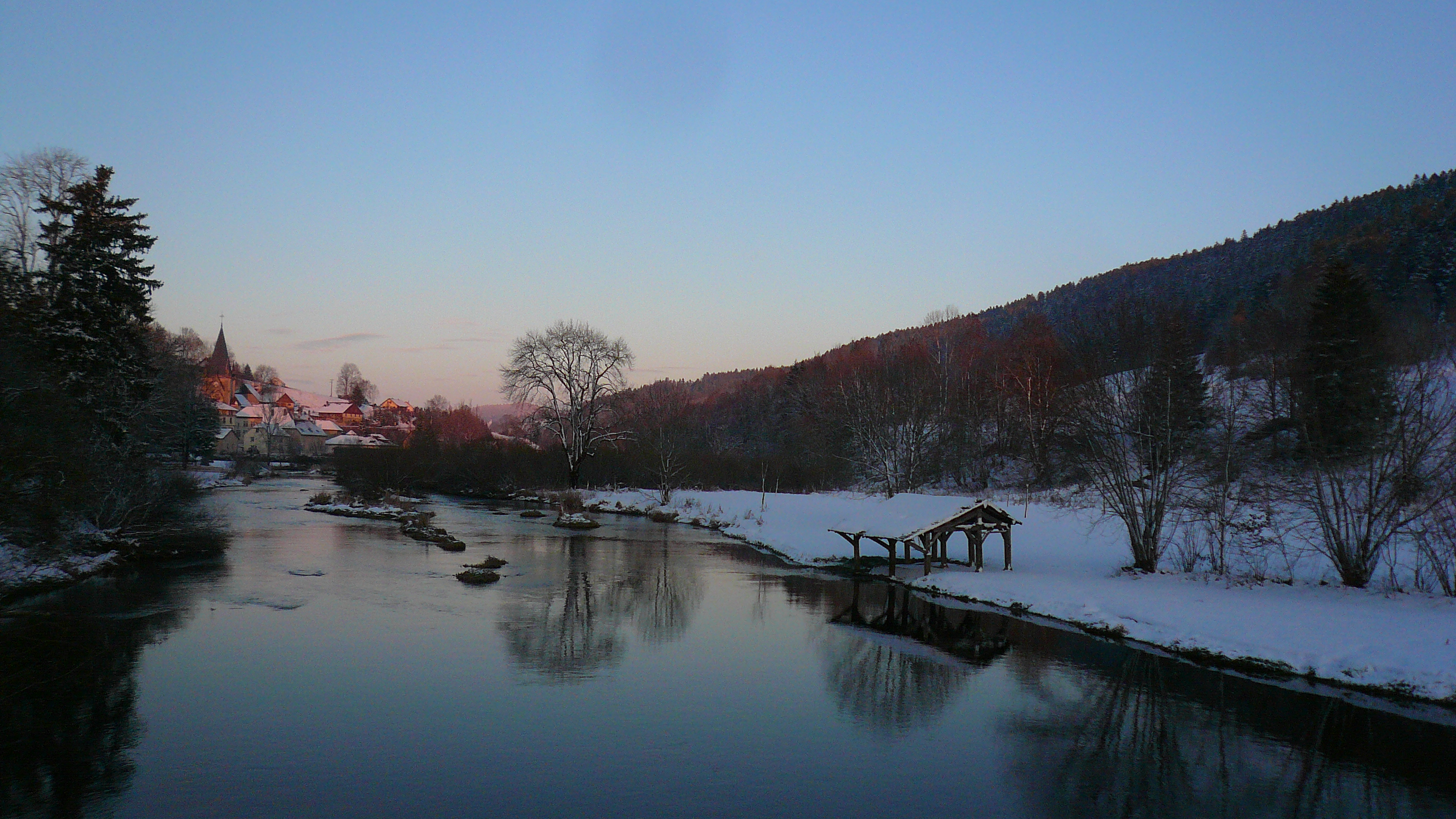 Montbenoît. Le Doubs devant le Château de Morand-Val. Ce lieu est le cadre des premières scènes du film français "Microcosmos : Le Peuple de l’herbe" (1996) consacré aux insectes et produit par Jacques Perrin.